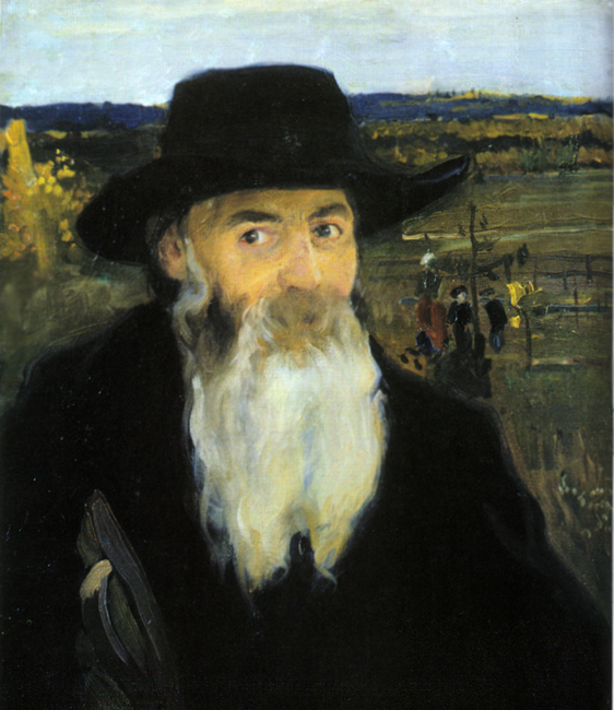 Ukrainian: Старий вчитель. Портрет Миколи Мурашкаtitle QS:P1476,uk:"Старий вчитель. Портрет Миколи Мурашка" label QS:Luk,"Старий вчитель. Портрет Миколи Мурашка"